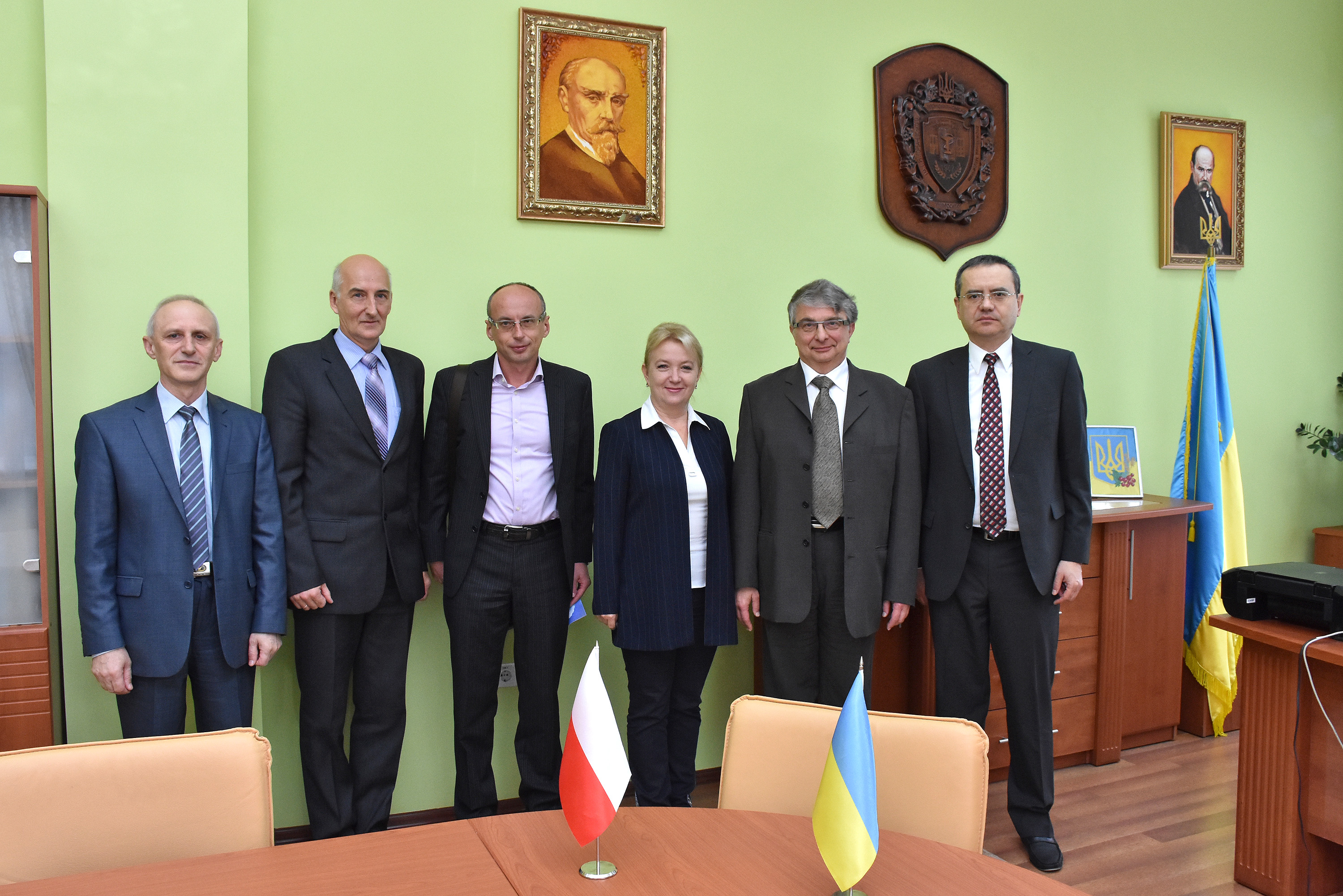 Науковець Вроцлавського медичного університету, почесний професор Тернопільського державного медичного університету імені І. Я. Горбачевського Войцех Барг із візитом у ТДМУ 22 вересня 2016 року. Зліва направо: проректор ТДМУ, професор Іван Кліщ, професор Леонід Грищук, професор Ігор Господарський, Наталія Лісничук, почесний професор ТДМУ Войцех Барг і ректор вишу, професор Михайло Корда.